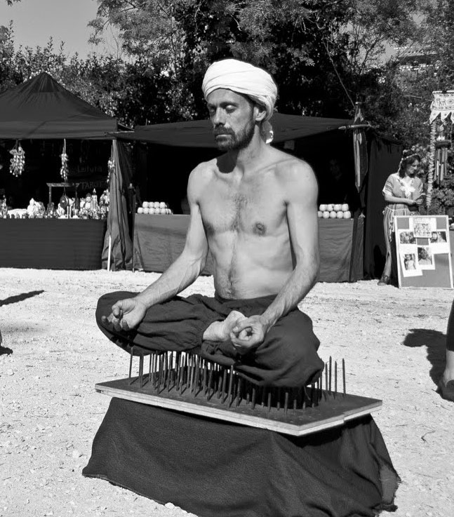 faquir em cama de pregos